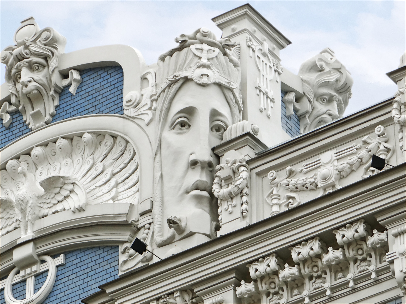 Partie supérieure de l'immeuble art nouveau (jugendstil) situé au n°10b de l'avenue Elizabeth (Elizabetes Iela) à Riga en Lettonie Architecte : Mikhail Eisenstein